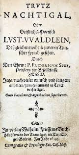 Trutz Nachtigal, oder Geistlichs-Poetisch Lust-Waldlein, Deßgleichen noch nie zuvor in Teut- scher sprach gesehen. Durch Den Ehrw: P. Fridericum Spee, Priestern der Gesellschaft JESU. Jetzo/ nach vieler wunsch und langem anhalten/ zum erstenmahl in Truck verfertiget. Cum Facultate & approbatione superiorum Cöllen/ In Verlag Wilhelmi Friessems Buch- händlers/ in der Tranckgaß im Erz-En- gel Gabriel. Im Jahr 1649. Cum gratia & Privilegio Sac. Caes. Maj.